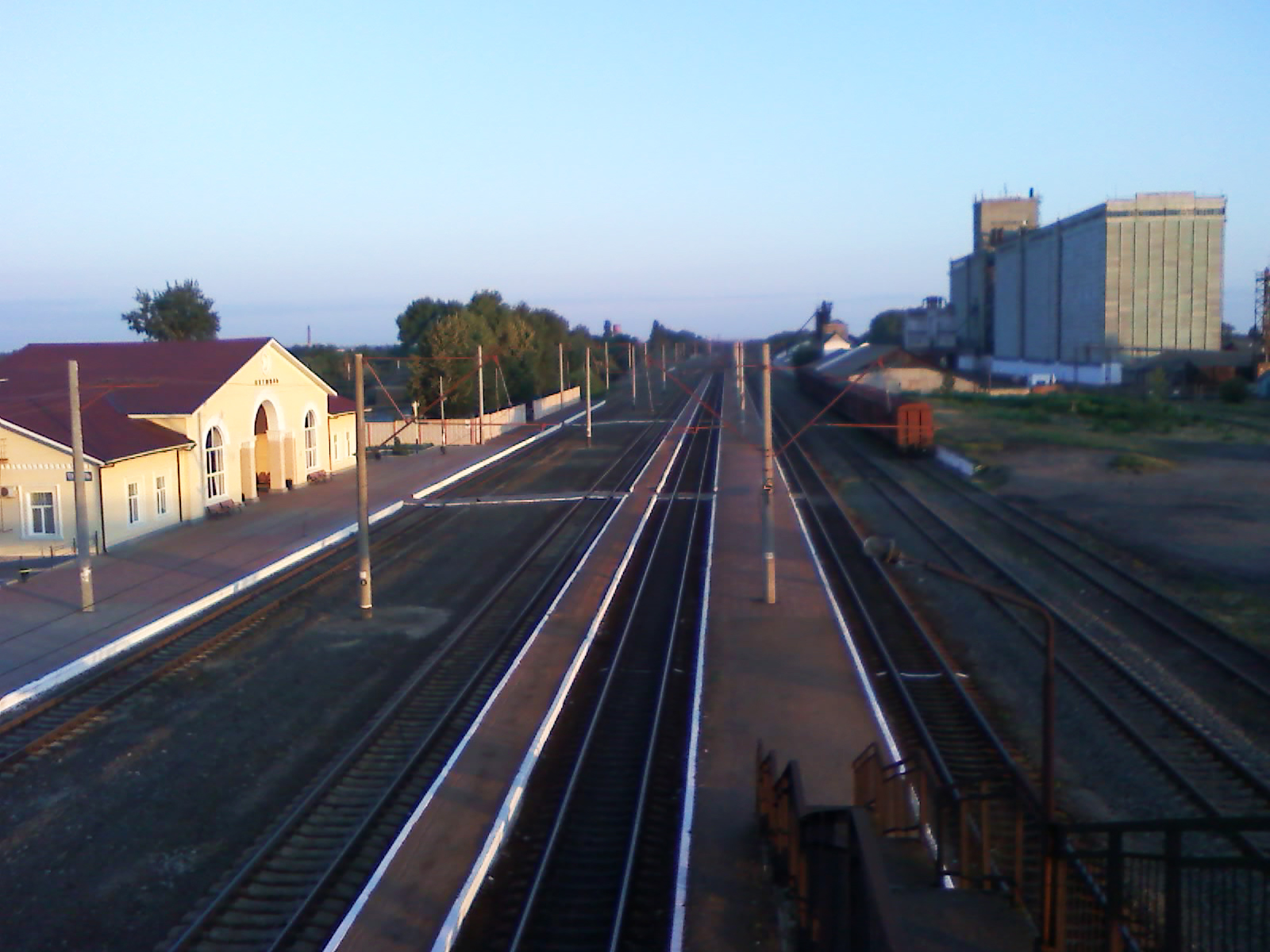 Залізничні колі ст Путивль (Буринь)